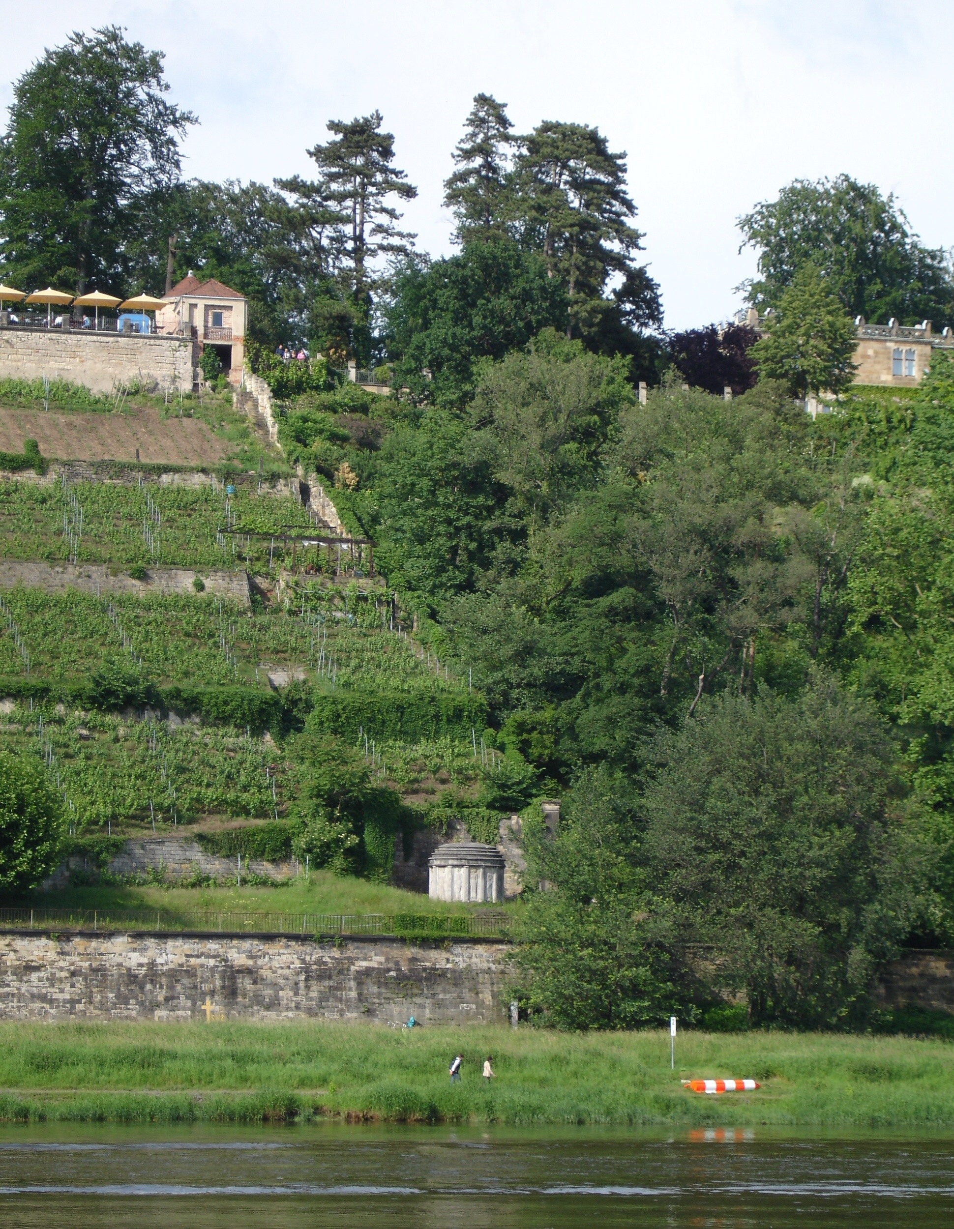 Mausoleum von K. A. Lingner am Fuße des Lingerschlosses in Dresden